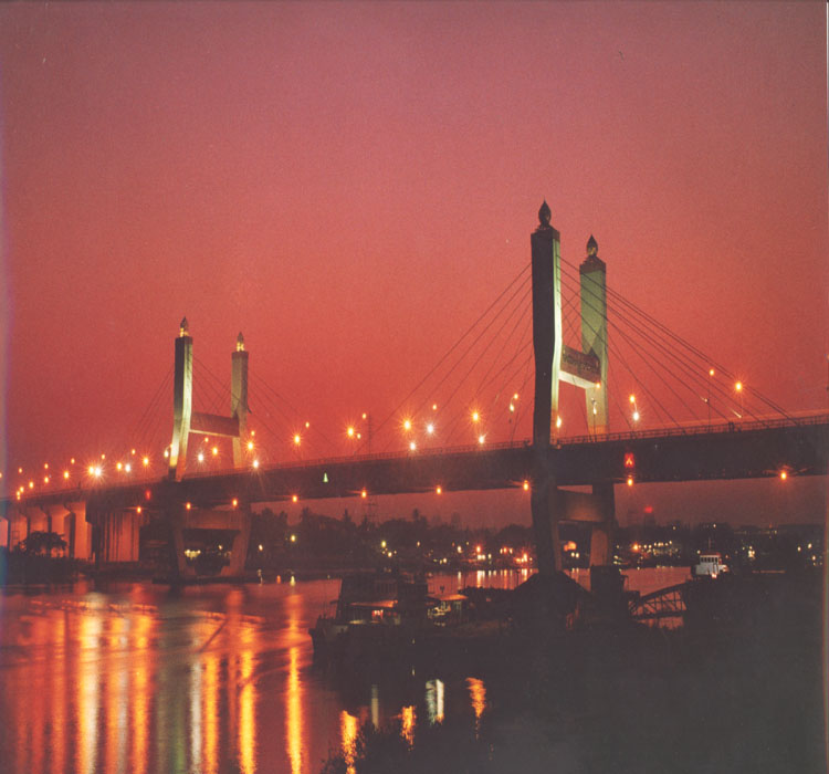 Pont Maha Bandula à Rangoon